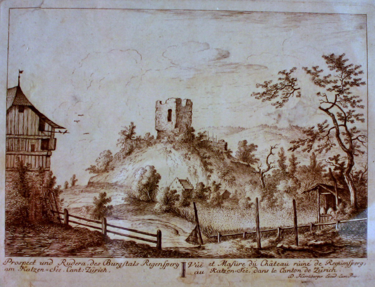 Regensdorf (ZH) : Historische Ansicht der Ruine der Burg Alt-Regensberg (Altberg). Beschreibung: Prospect und Rudera des Burg-Stals Regensperg am Katzen-See. Cant: Zürich.